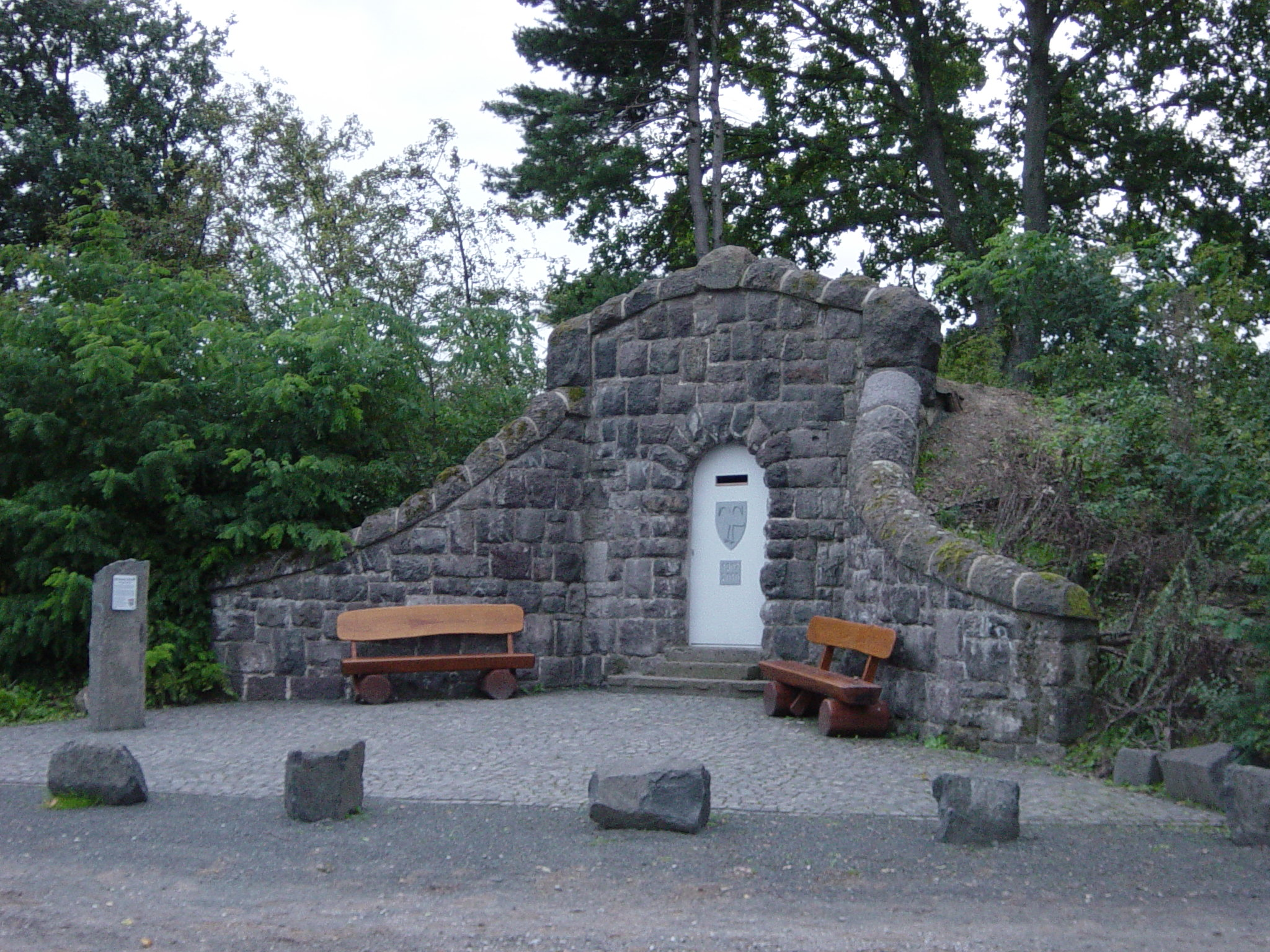 Wasserhaus bei Leihgestern, 1907 erbaut, seit 2010 Technisches Denkmal